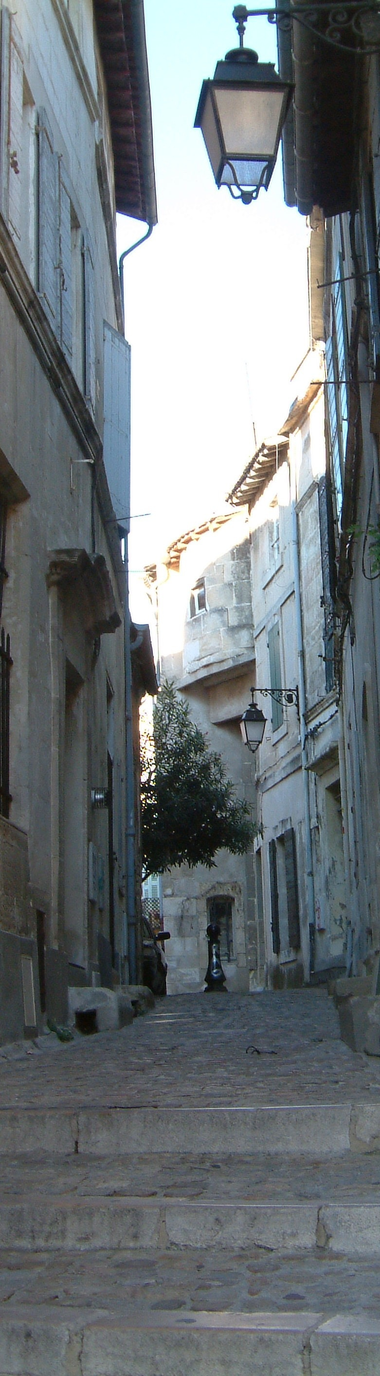 Arles: Gegenüber dem Amphitheater nahe bie der Rue Ernest Renan (Südfrankreich)